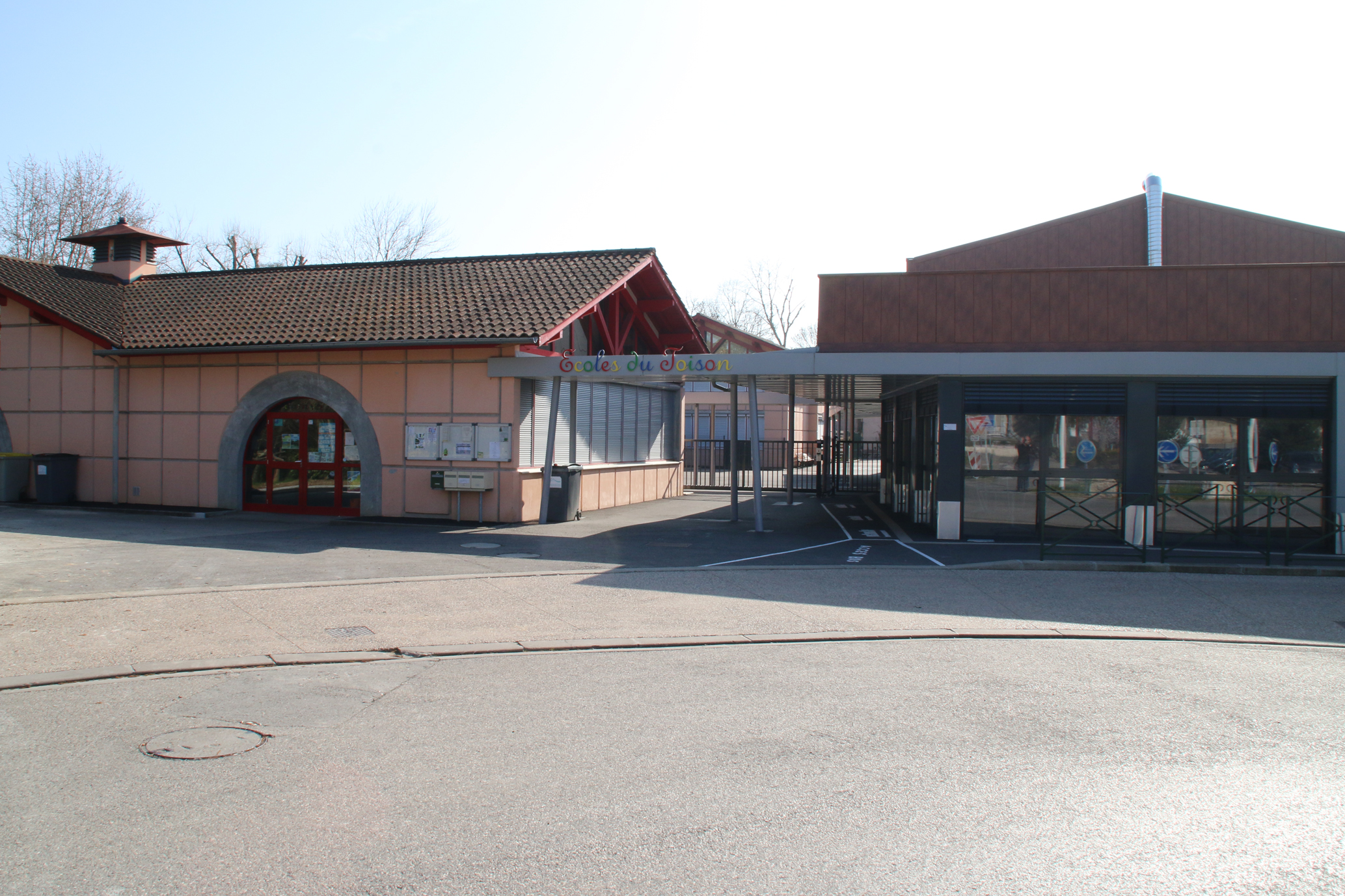 L'école du Toison doit son nom à la rivière qui borde l'établissement. Elle regroupe une école maternelle de quatre classes et d'une école primaire de onze classes.